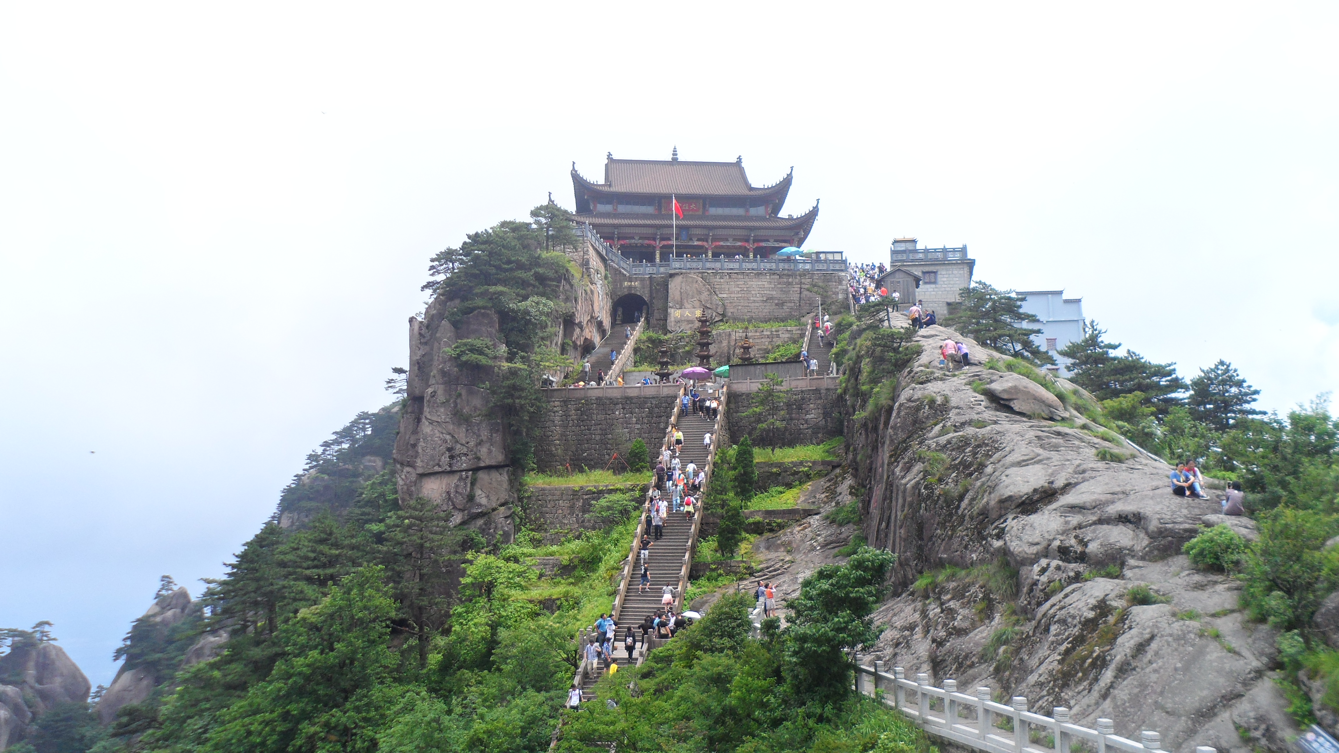 九华山天台